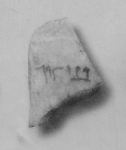 Masada, Ben Yair's ostracon (detail)